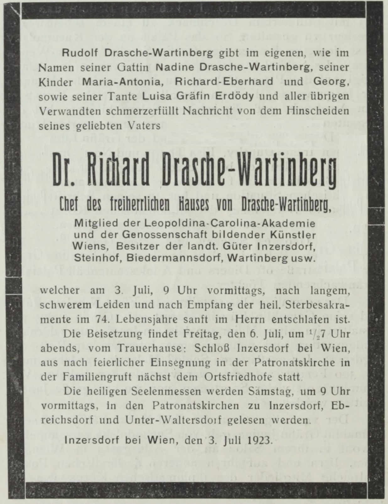 Todesanzeige für Richard Drasche Freiherrn von Wartinberg